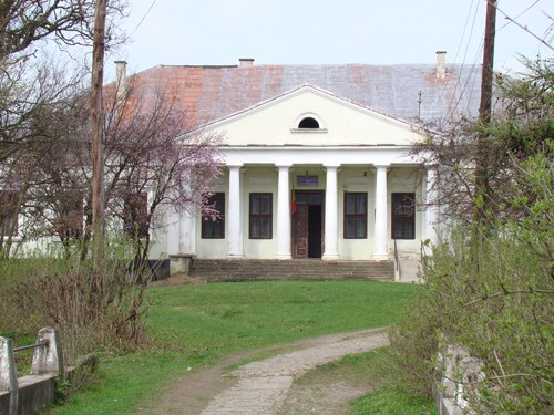 fosta scoala din Tisa